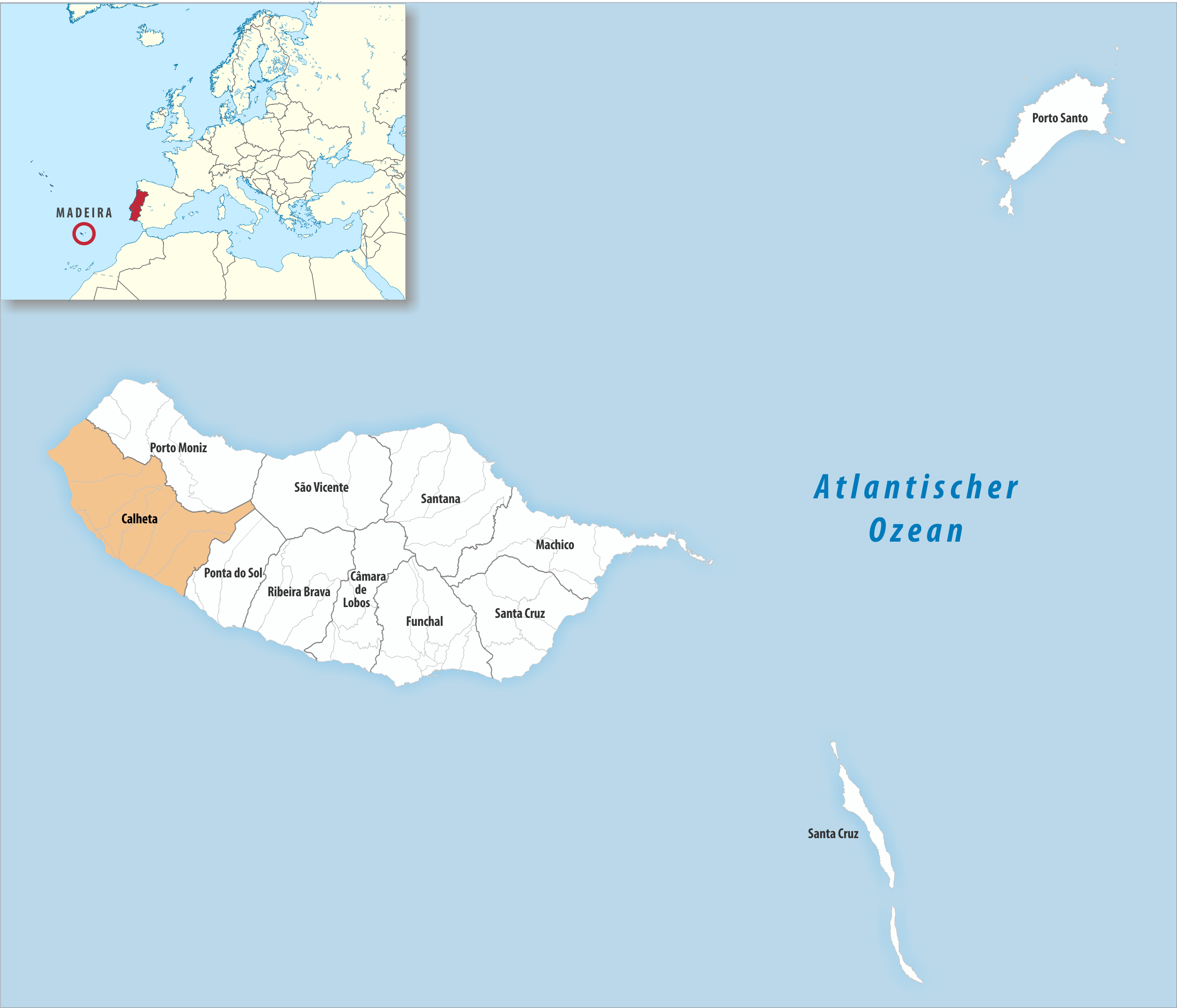 Kreis Velas